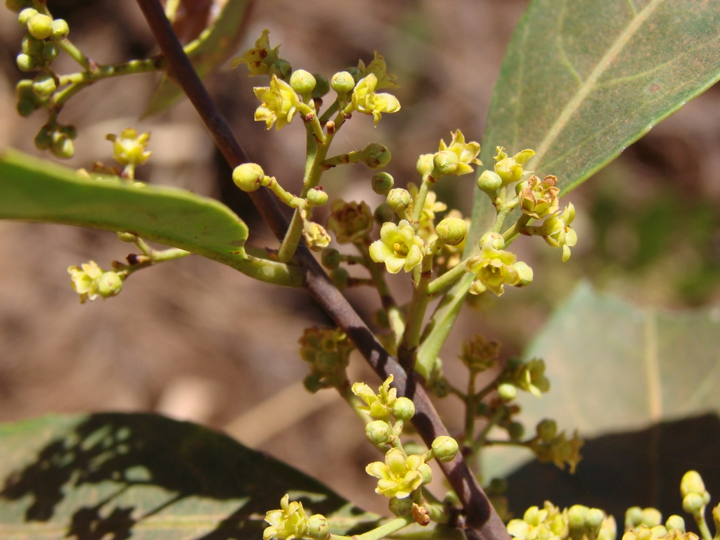 Flowers of Ocotea aciphylla (Nees & Mart.) Mez - LAURACEAE - Jardim Botânico de Brasília - Brasília - Distrito Federal - Brasil.